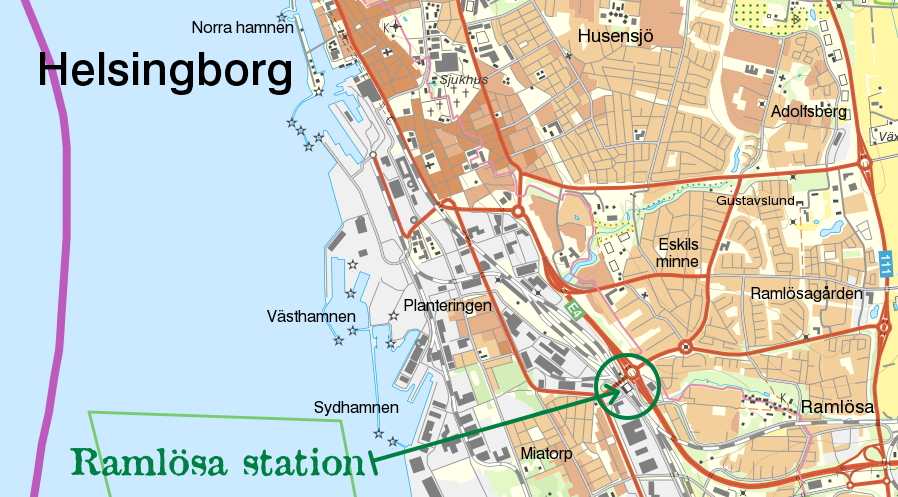 Kartbild över sydöstra Helsingborg. Ramlösa (pendeltågs)station utmärkt.